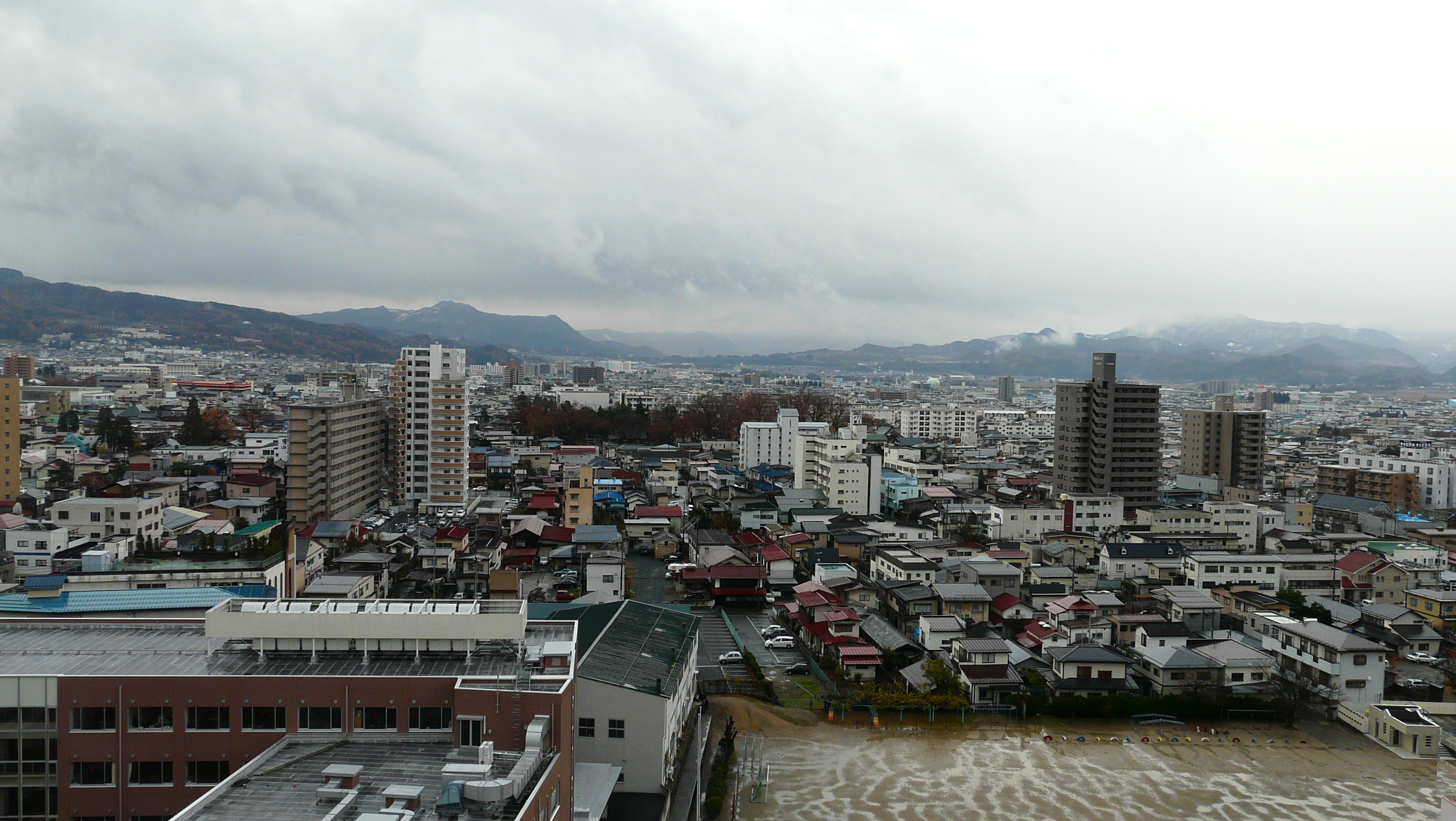 yamagata city